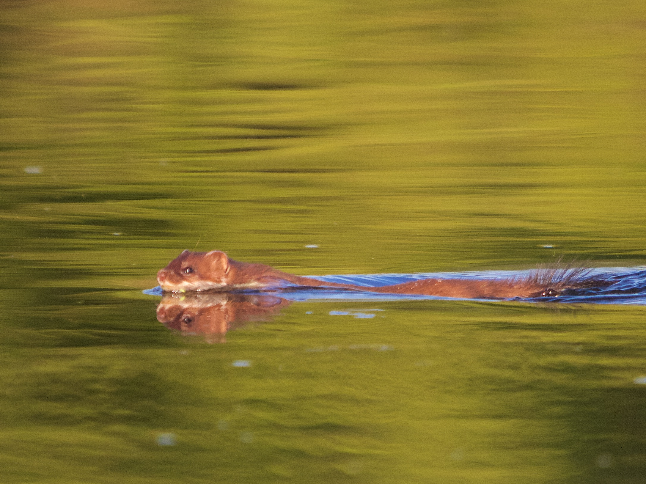 Hermelijn zwemmend door het water. Deze was eerst aan het jagen achter een meerkoet en zwom hierna vlak langs mij af.